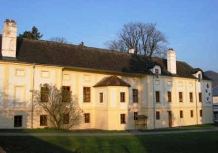 Wohnungstrakt des Hellerhofs Paudorf